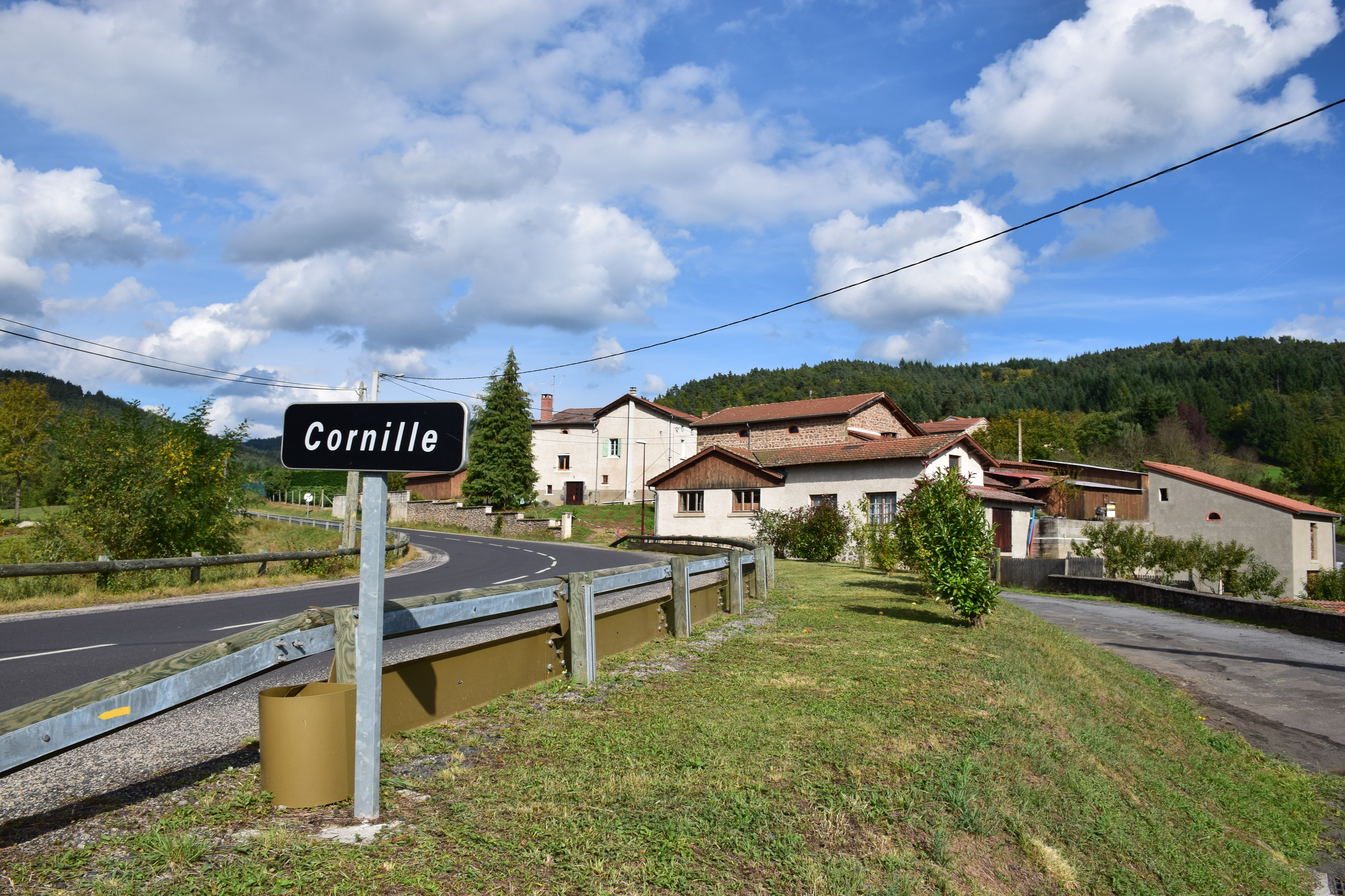 Entrée du lieu-dit « Cornille », qui appartient à la commune de Javaugues.